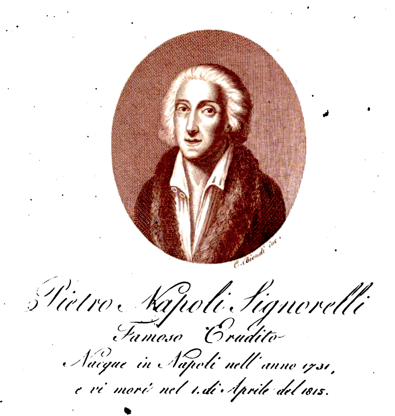 Pietro Napoli Signorelli, incisione di Carlo Biondi (1789-?)